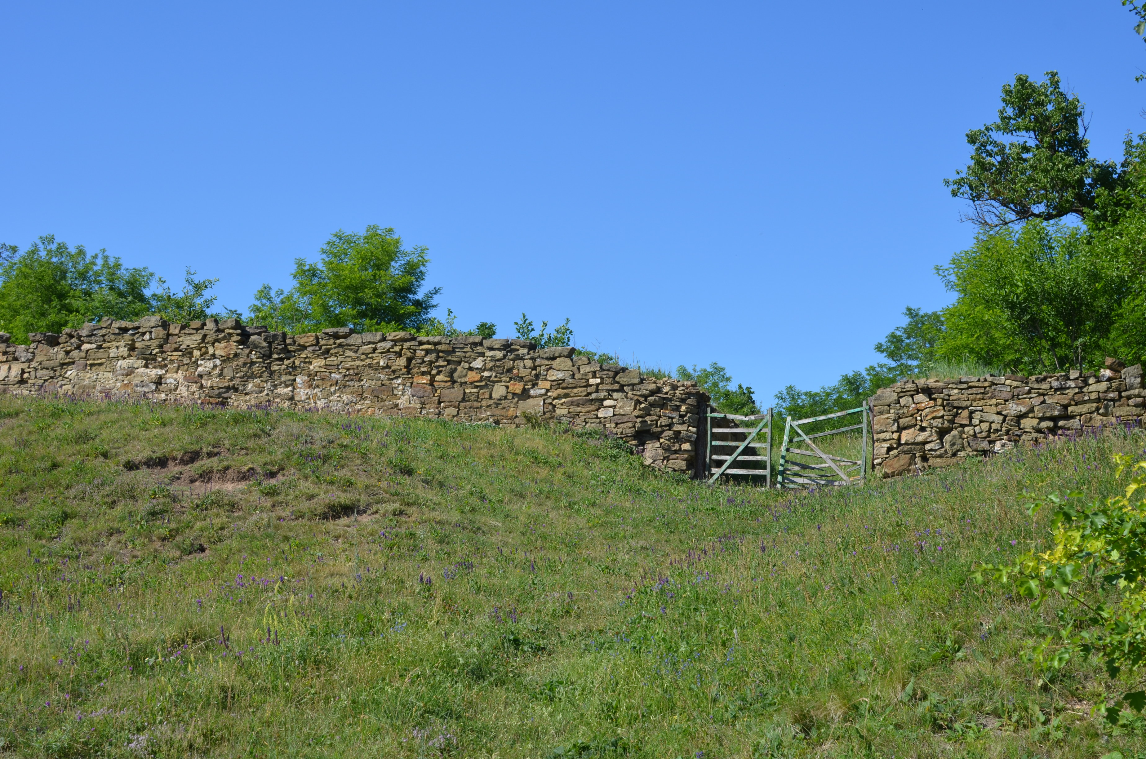 Єврейські поховання у с. Яришів